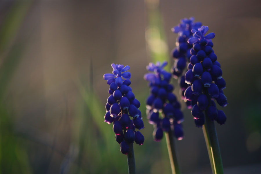 Szafirek drobnokwiatowy